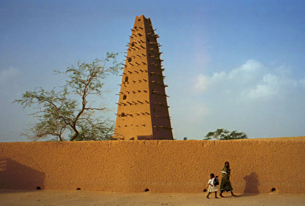 Mosque in Agadez, Niger. Photographed 1997.1997 #277-9A Agadez mosque